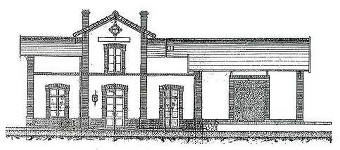 Plan type d'une gare Réseau Breton